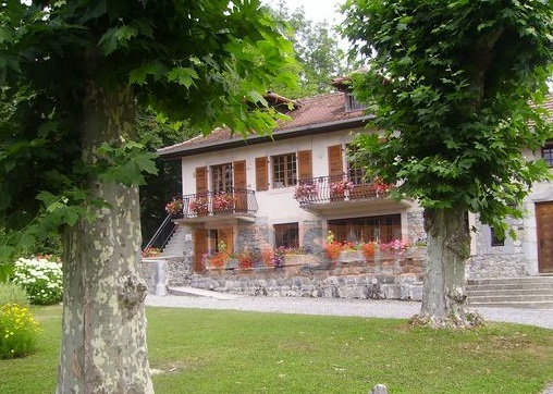 Locaux de l'I.L.S. à Habère-Lullin (mairie dans le prolongement du bâtiment)